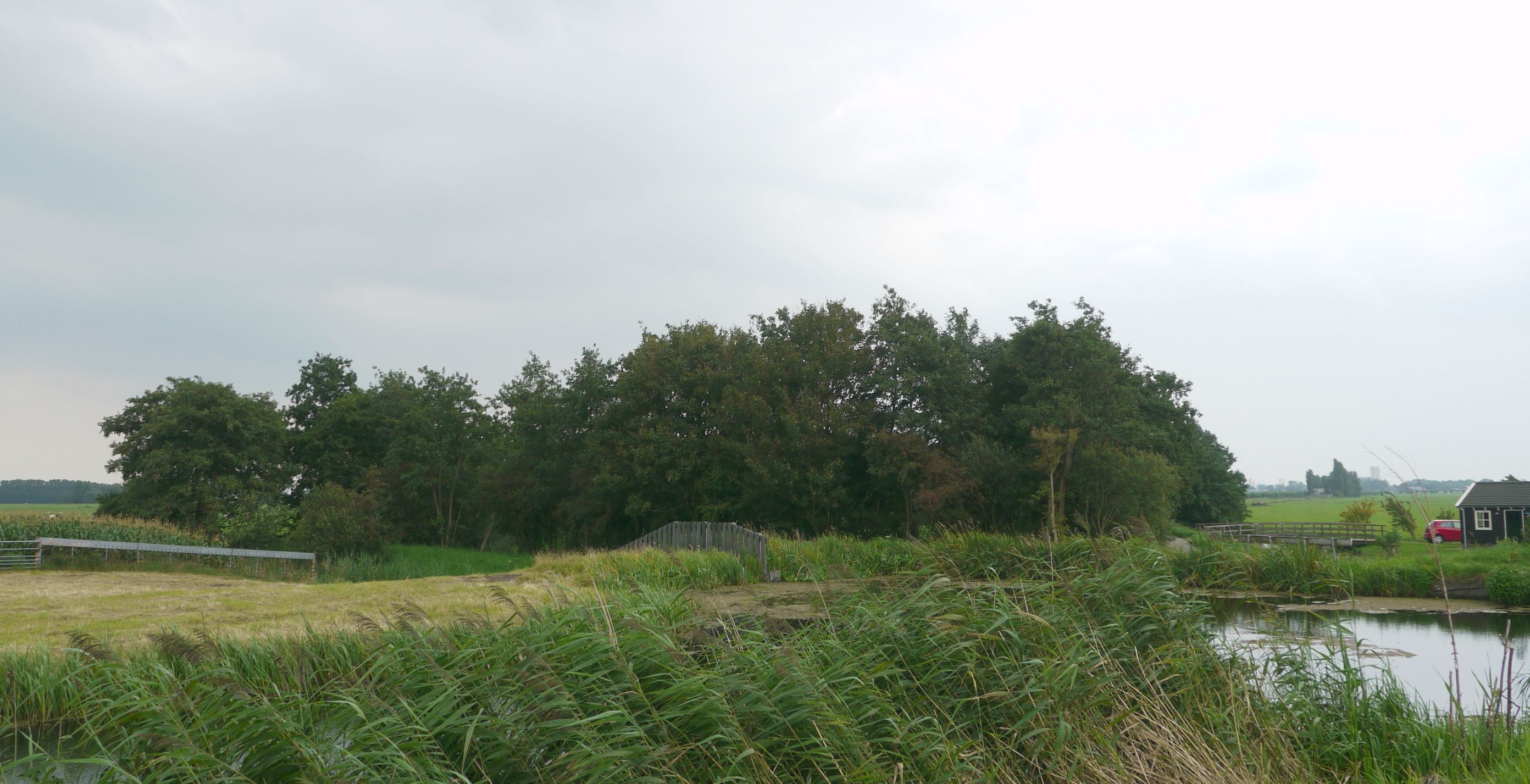 Geriefbosje: Een bosje dat dient voor het kweken van brandhout voor de eigen kachel. Foto genomen in de Vlietpolder, omgeving Ofwegen, bij de Lagenwaardse molen.